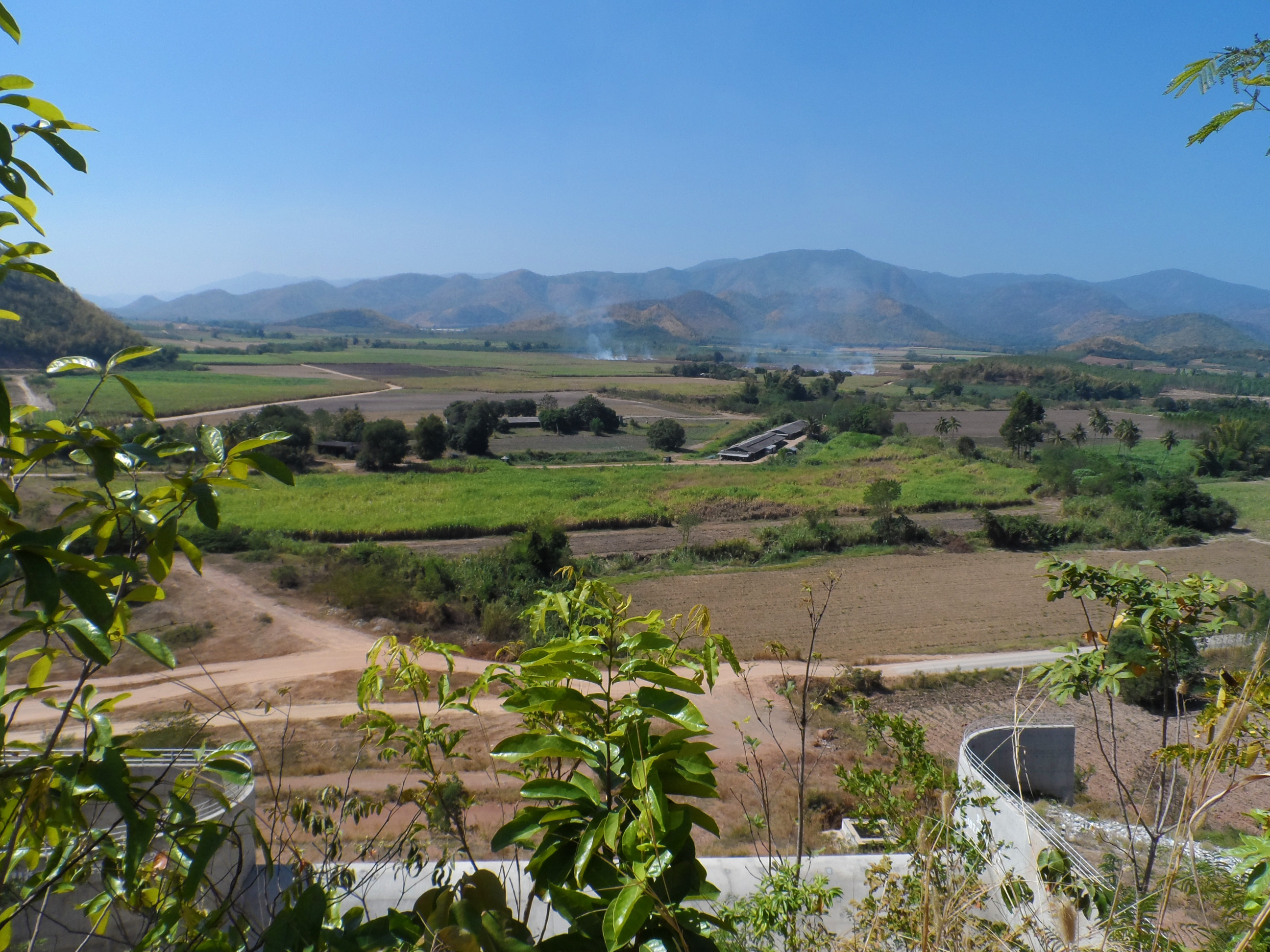 ภูมิประเทศอำเภอหนองปรือ